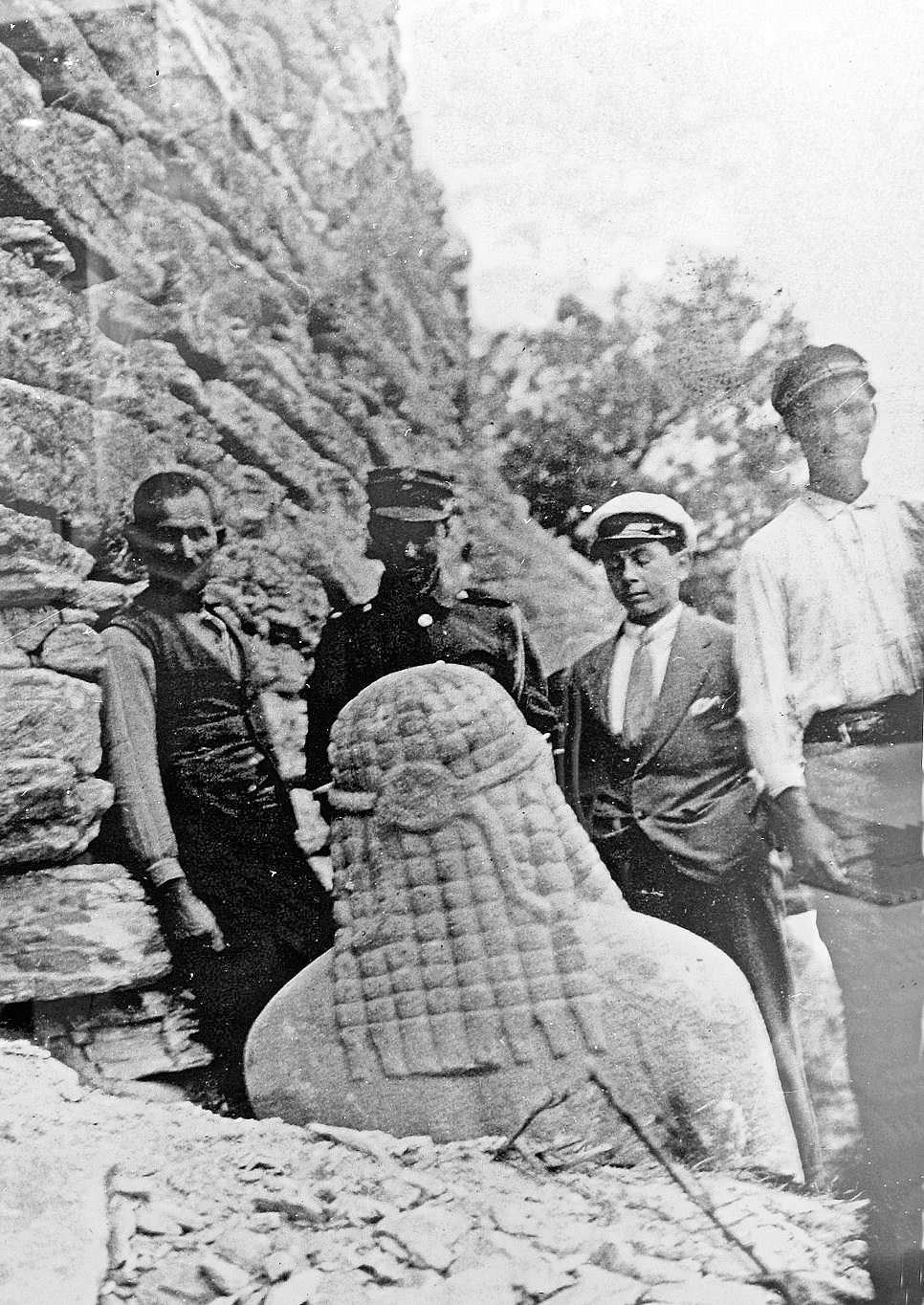 Ausgrabung des Kouros auf der Akropolis, vor der Terrassenmauer im Westen des Pythion, durch die École française d’Athènes im Jahre 1914